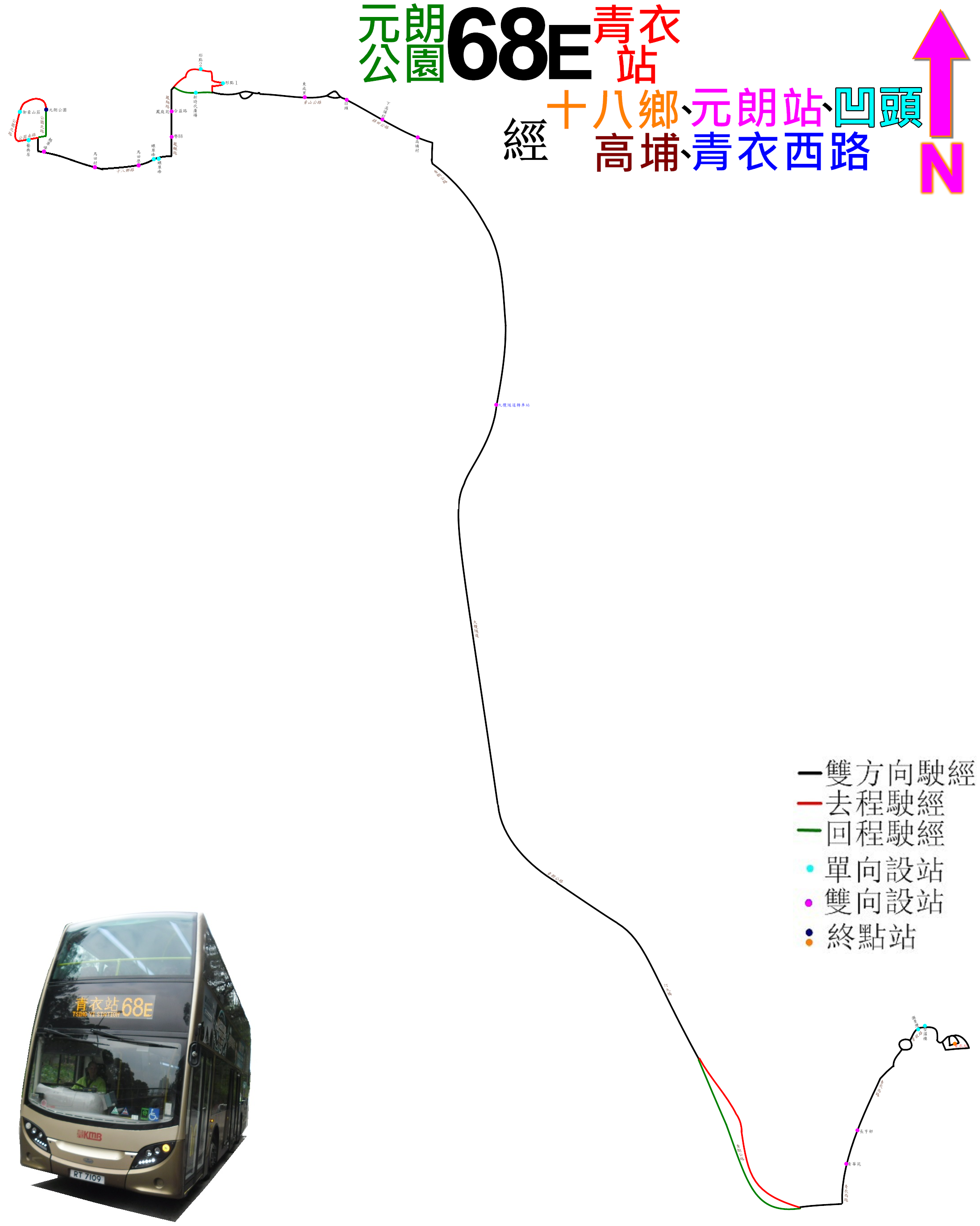 中文（香港）: 九巴68E線的走線圖